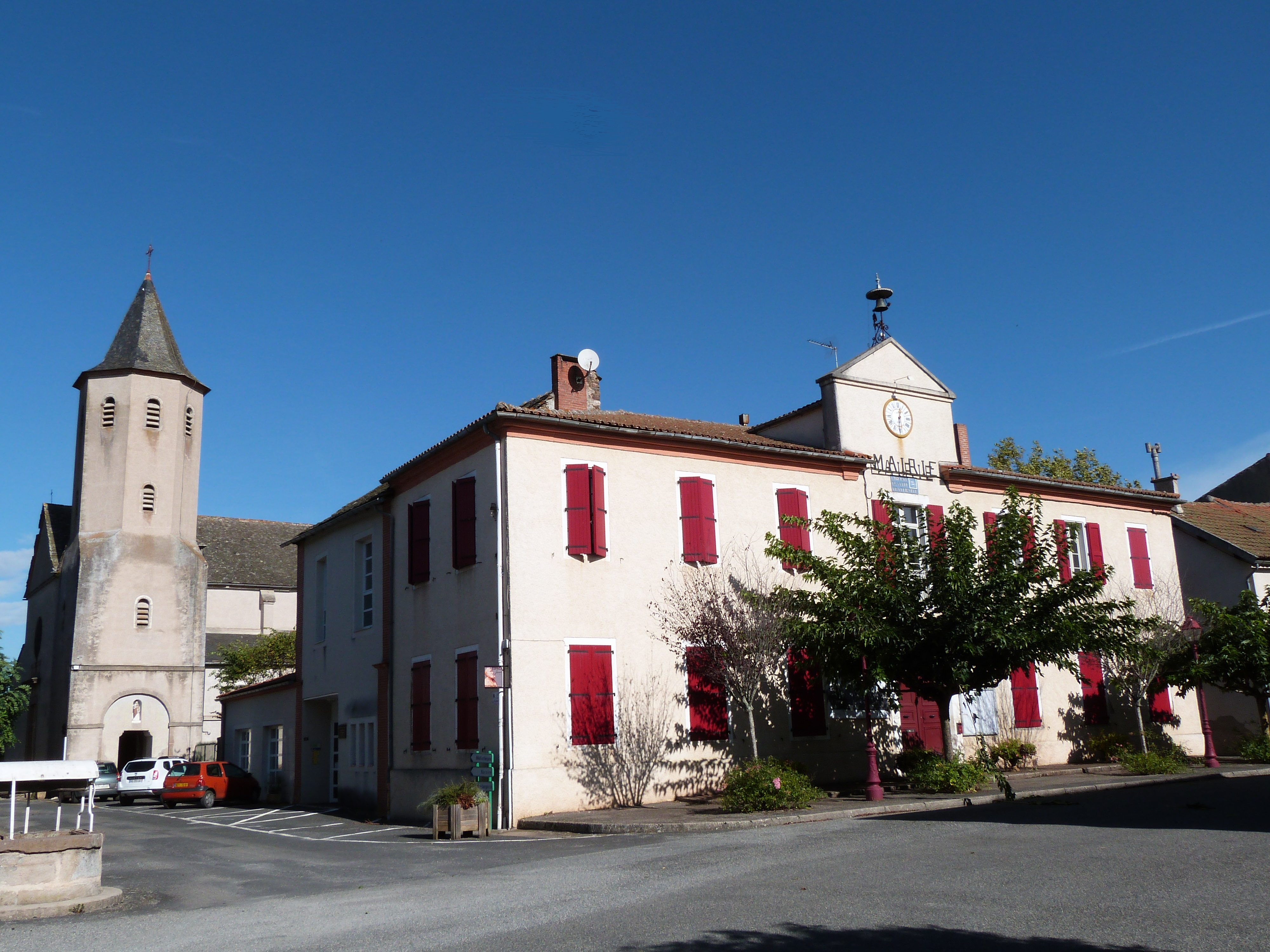 Eglise et façade de la mairie de pampelonne